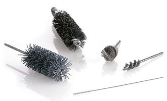 Innenbürsten eignen sich besonders für das Entgraten von O-Ring-Einstichen und Bohrungen zum Reinigen, Glätten und Entrosten. Sie kommen bei Bohrmaschinen, biegsamen Wellen und Bearbeitungszentren zum Einsatz. Siederohrbürsten dienen speziell zur Rohrinnenreinigung beim Entrosten, Reinigen und Entzunden. Bei der Handbearbeitung und im Einsatz in biegsamen Wellen sowie stationären Maschinen werden sie verwendet. Aphahonbürsten sind elastische, flexible Werkzeuge mit Kügelchen aus Schleifmittel in einer Kunstharzbindung an deren Borstenspitzen. Sie werden eingesetzt in den Bereichen Zylinder- und Kolbenlaufflächenbearbeitung. Sondertypen mit flachgepreßtem Draht sind auf Anfrage zu bekommen.